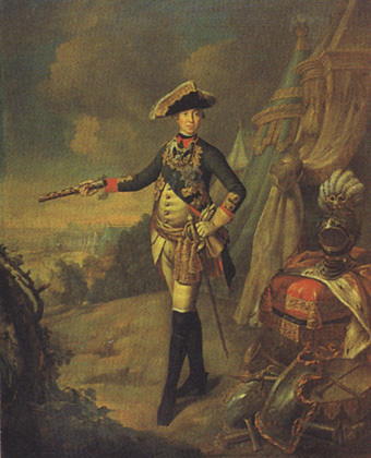 Публикуемое произведение во многом схоже с портретом Петра III (1762. ГРМ), предположительно, работы Ф.С. Рокотова.